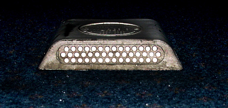 Dispositif rétro-réfléchissant; Catadioptre à billes de verre.